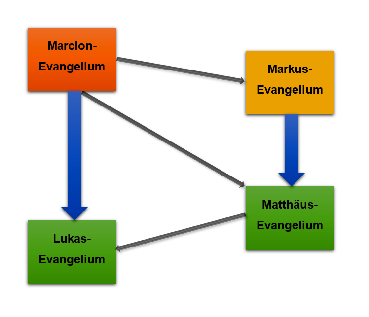 Beziehungsmodell Marcionevangelium zu Synoptischen Evangelien bei Klinghardt; blaue Pfeile: starke Abhängigkeit, graue Pfeile: schwächere Abhängigkeit. Matthias Klinghardt: Das älteste Evangelium und die Entstehung der kanonischen Evangelien. Untersuchung – Rekonstruktion – Übersetzung – Varianten. 2 Bände. Francke Verlag, Tübingen 2015, S. 191.